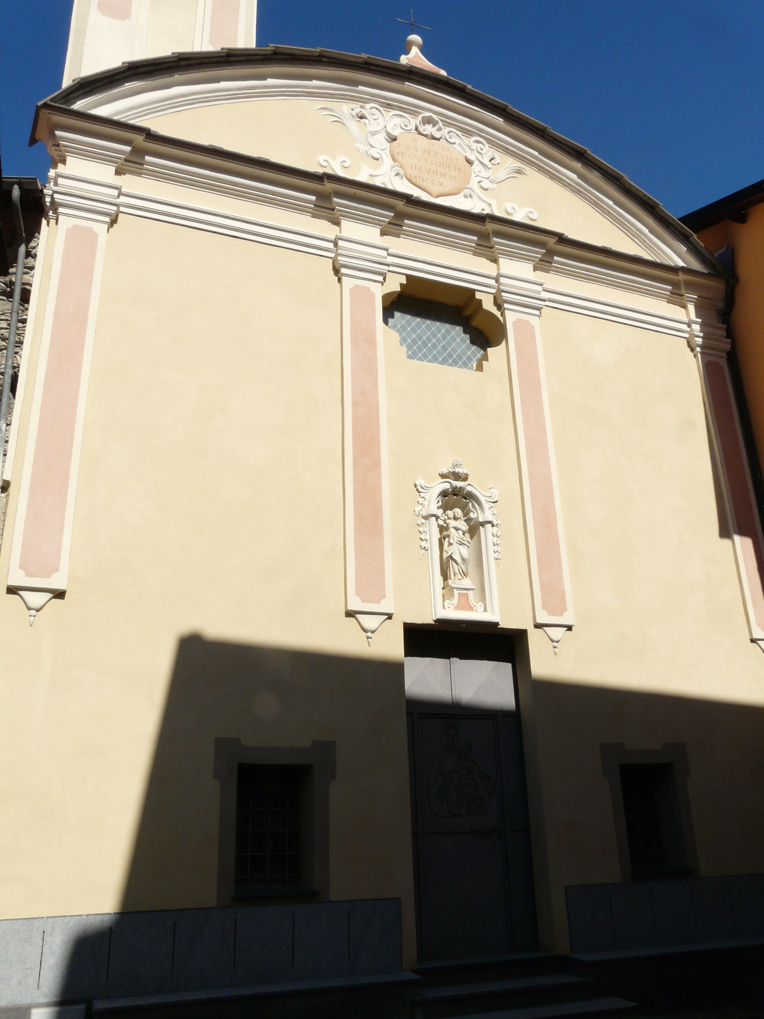 Oratorio della Madonna delle Vigne, Ranzo, Liguria, Italia